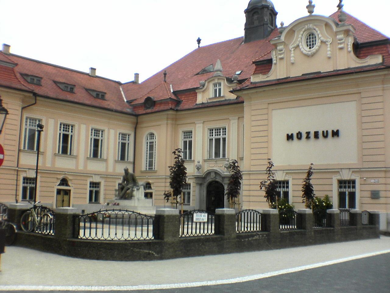 Podunajské múzeum in Komárno